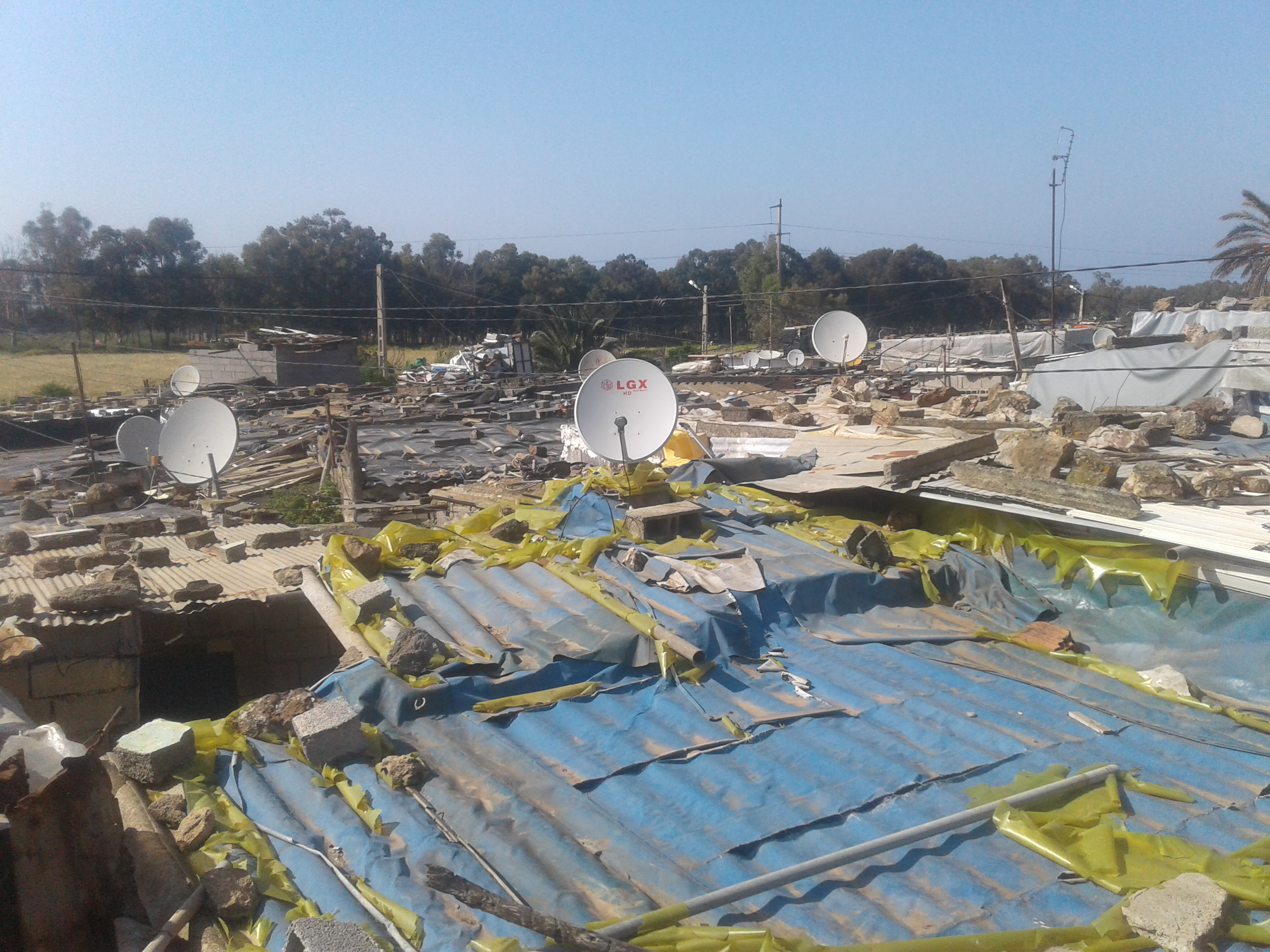 إحدى مدن الصفيح في الصخيرات